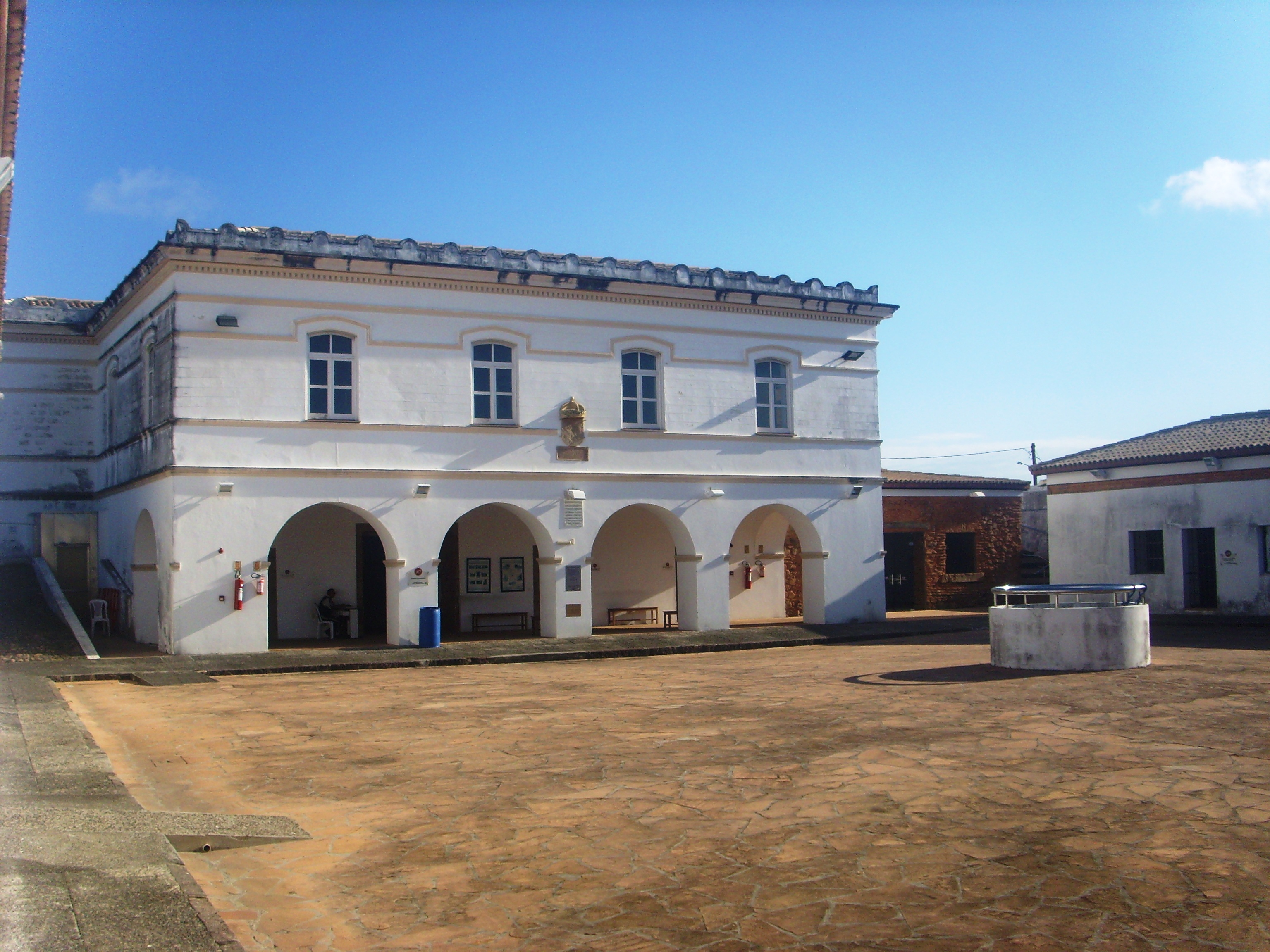 Parte interna do Forte de Santo Antônio além do Carmo - Salvador/BA